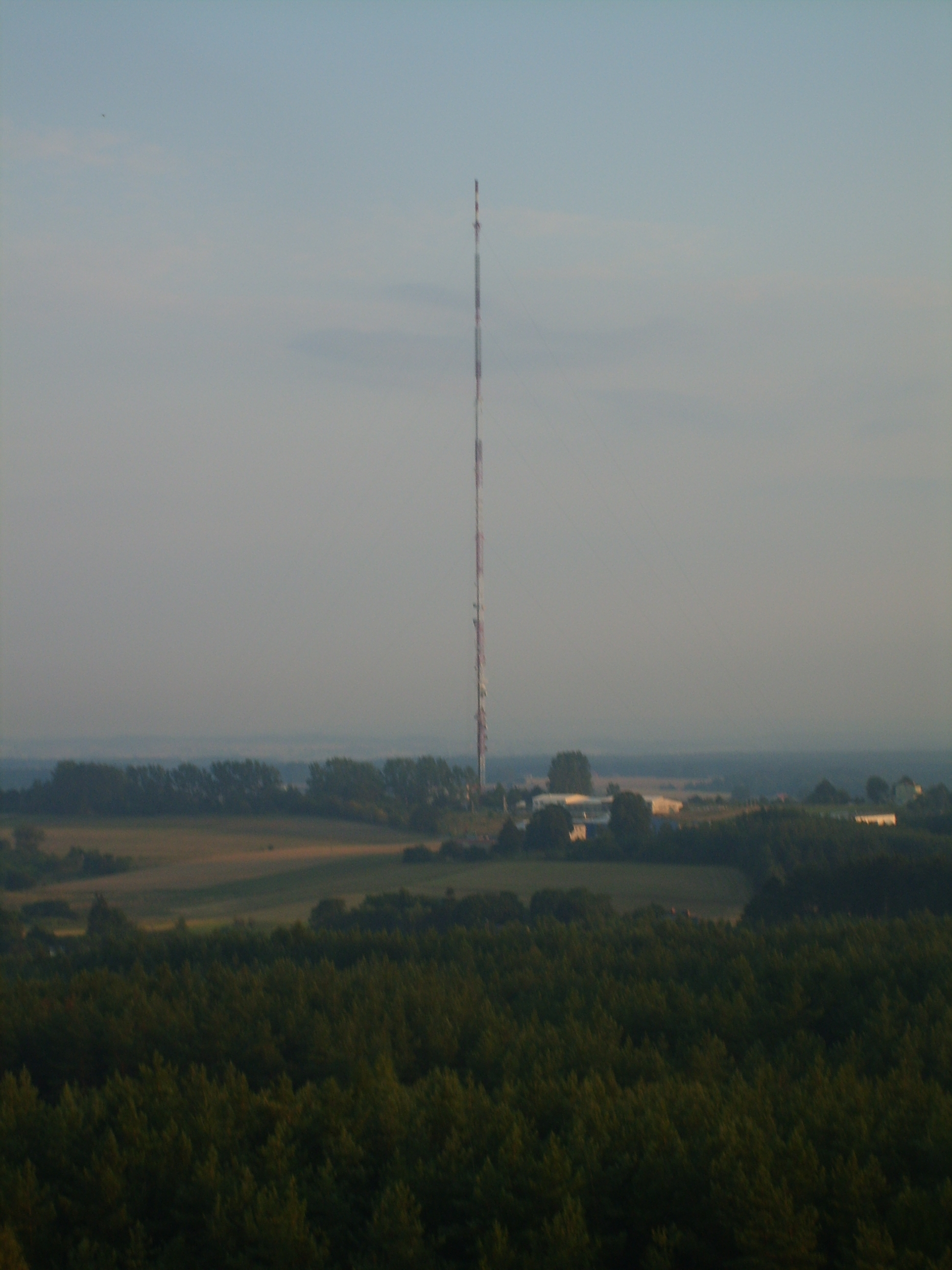 Maszt radiowo-telewizyjny w Chwaszczynie. Widok z platformy widokowej na górze Donas (Gdynia).